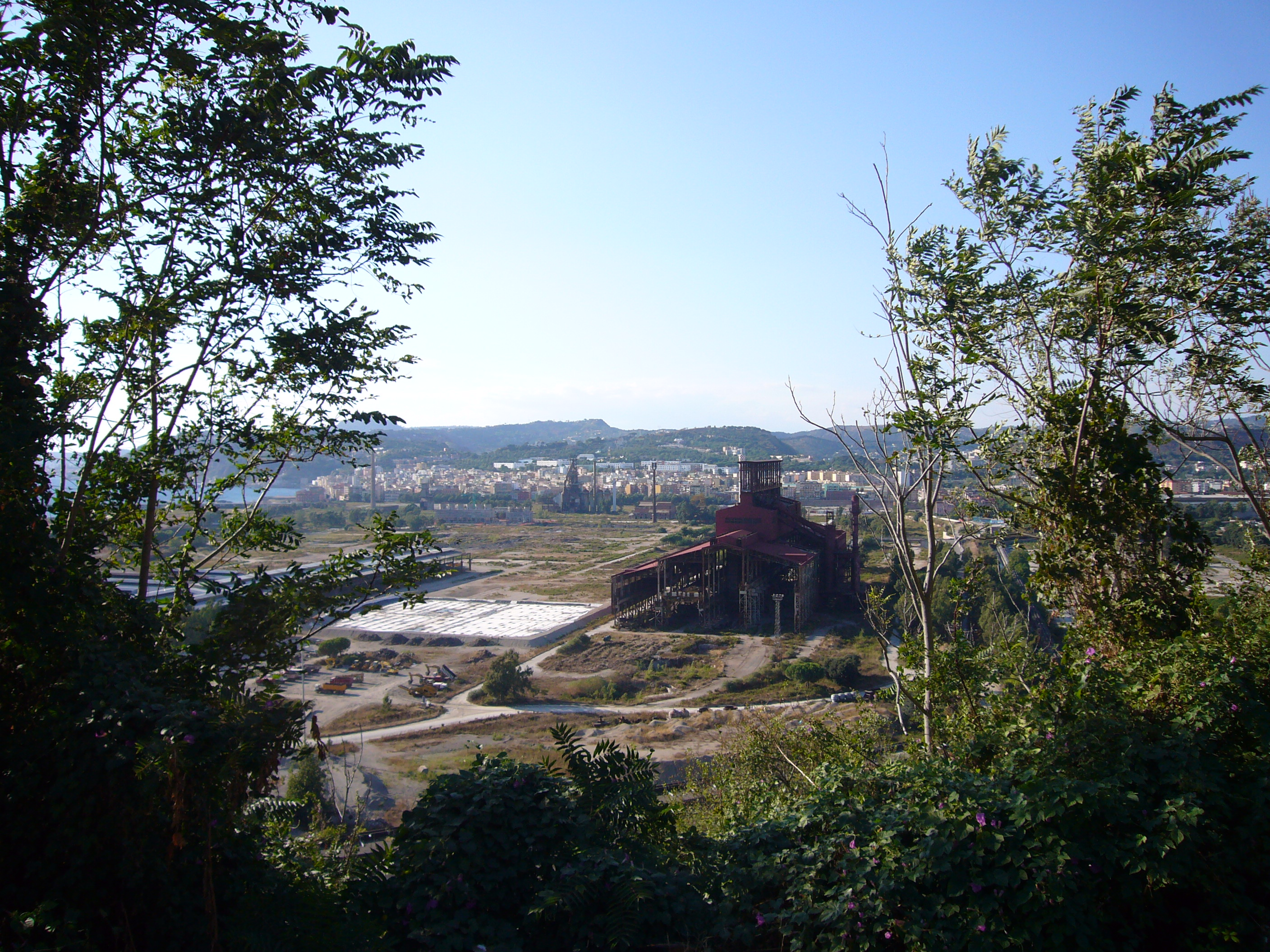 Napoli: Bagnoli, spazio ex Italsider da Posillipo